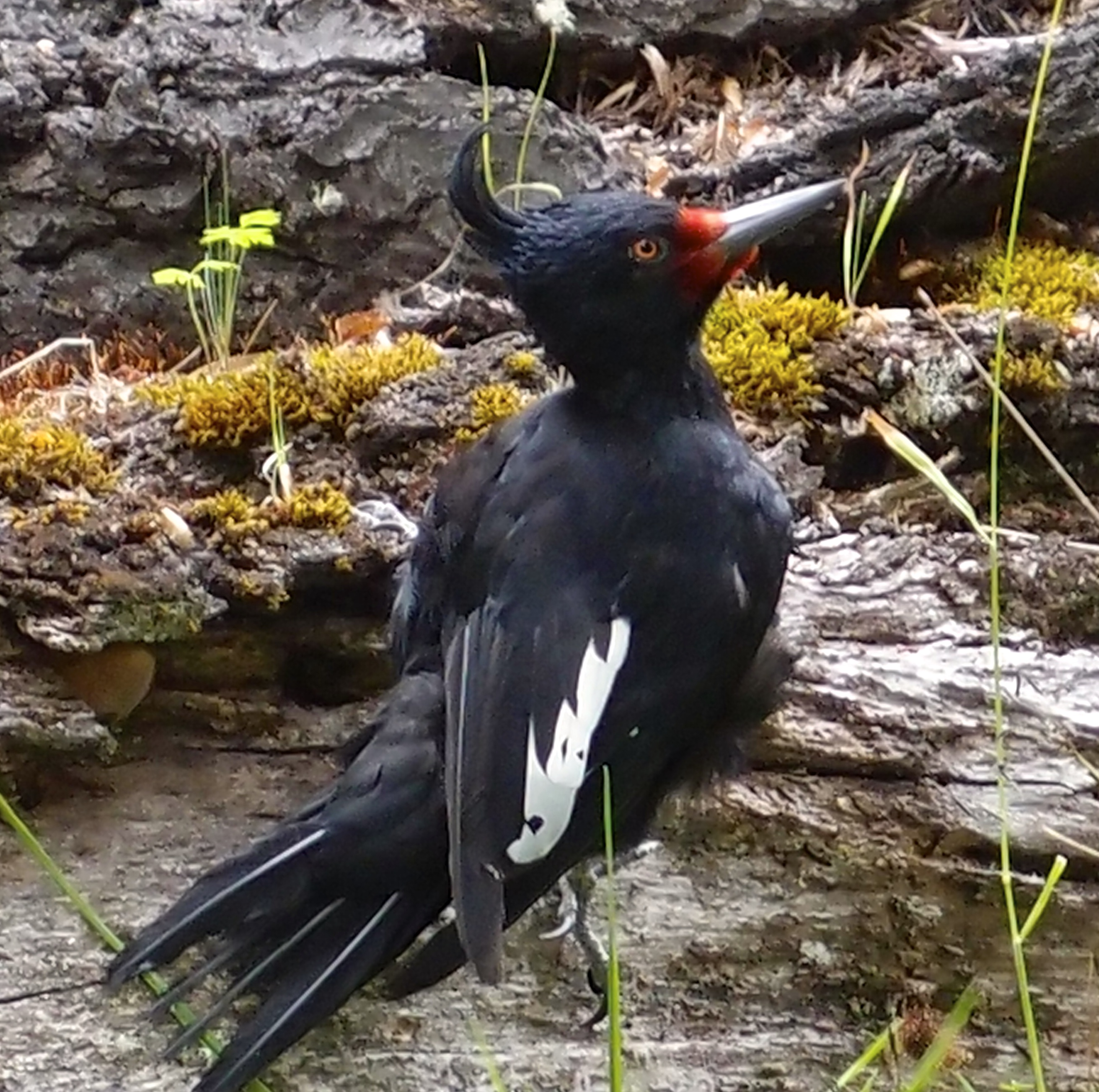 Diesen Vogel entdeckte ich während einer Wanderung im Fitz Roy Nationalpark in Argentinien